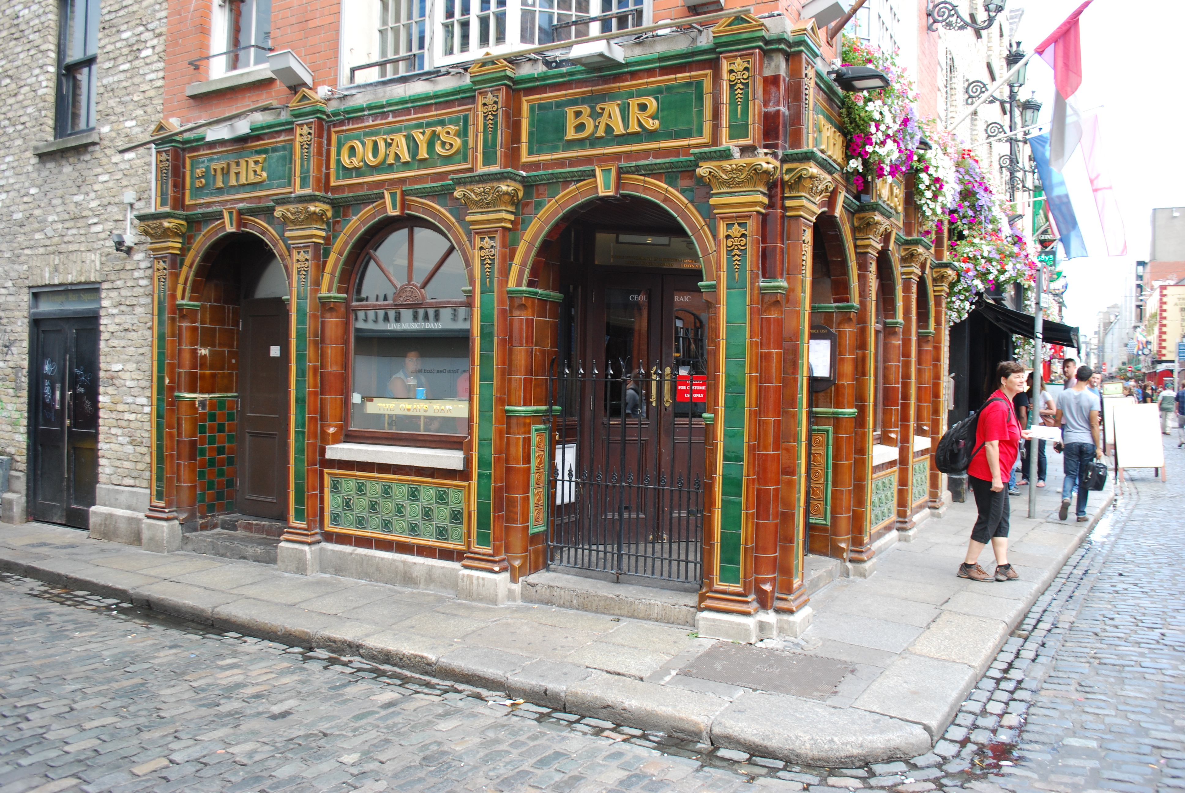 Vue du quartier de Temple Bar à Dublin.